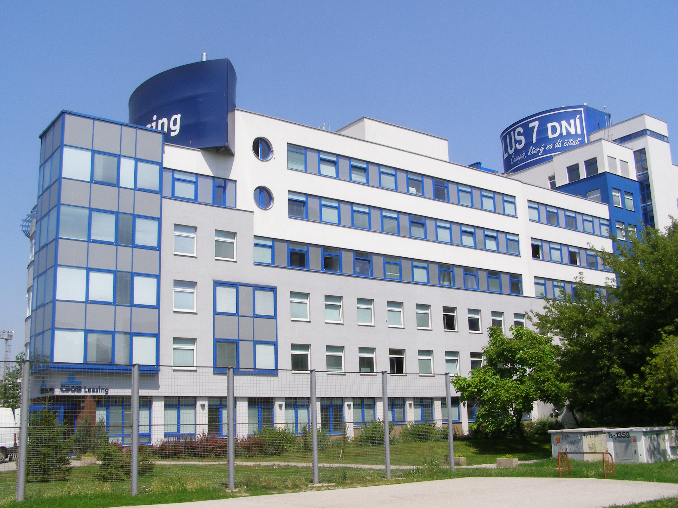 PLUS 7 DNI HOUSE